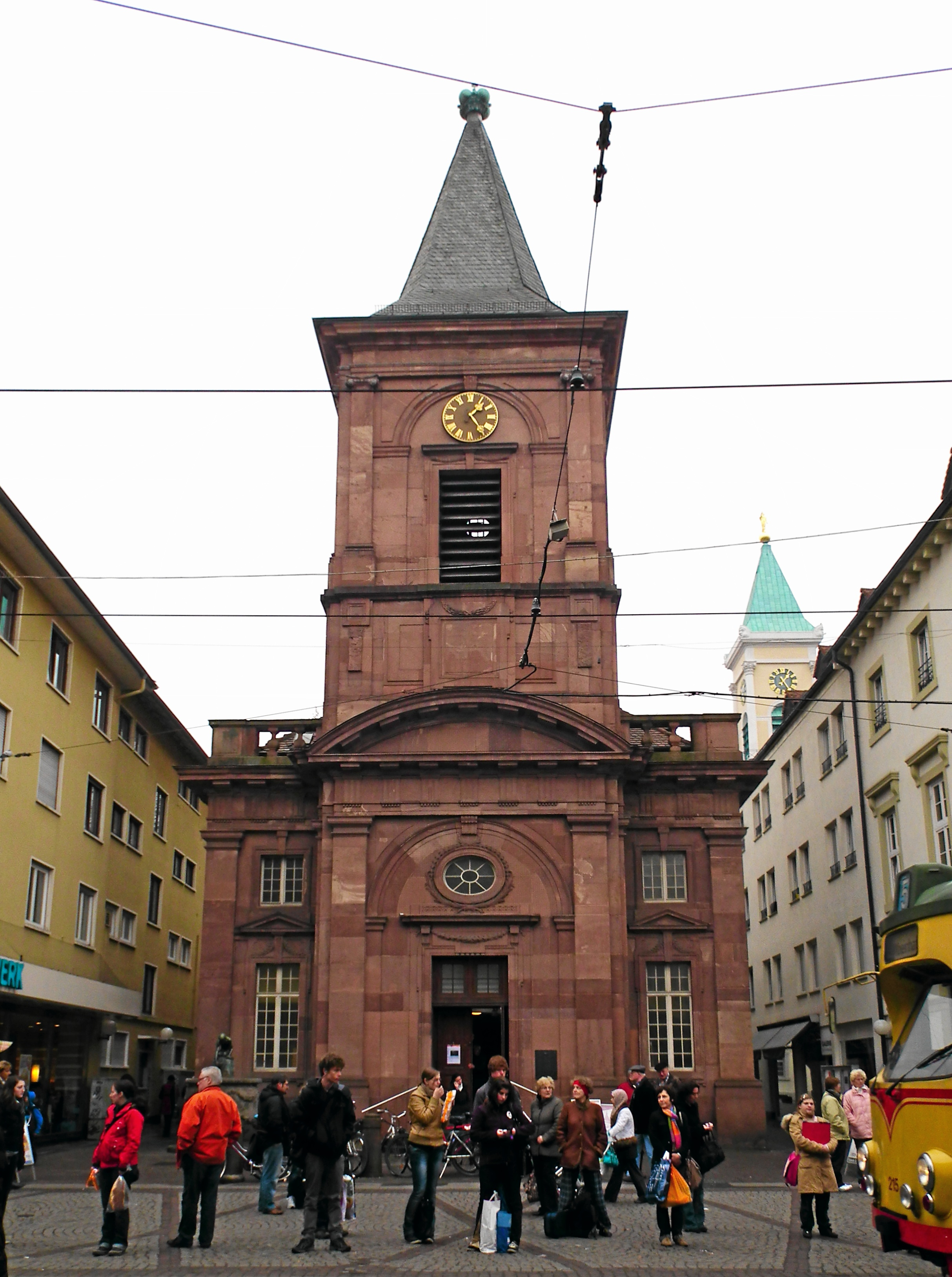 Kleine Kirche in Karlsruhe (Baden-Württemberg, Deutschland)